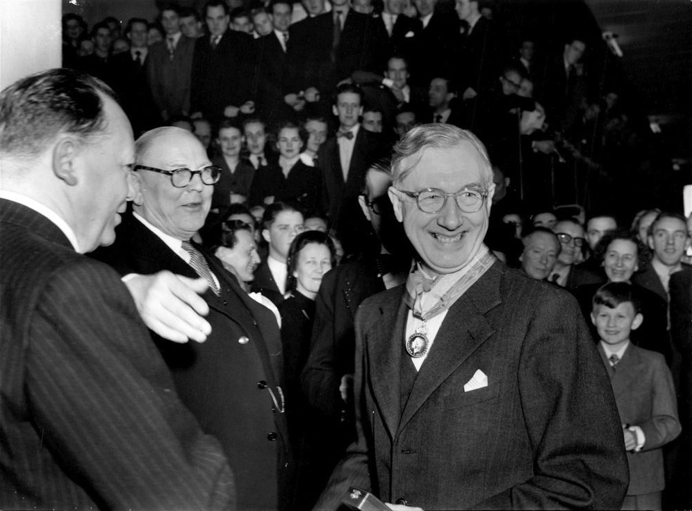 Generaldirektör Axel Gjöres, boktryckare Simon Söderstam och nymedaljerade redaktör Anders Billow. "Ännu kan man bryta arm om det behövs" sade kungl. boktryckaren Simon Söderstam och tittade sig utmanande omkring bland hedersgästerna vid det prunkande födelsedagsbordet i det nya Rotohuset i Solna. Invigningen hade påpassligt förlagts till seniorchefens 70-årsdag just den måndagen. 700 anställda och 500 inbjudna gäster trakterades lätt mat, tal och sång.